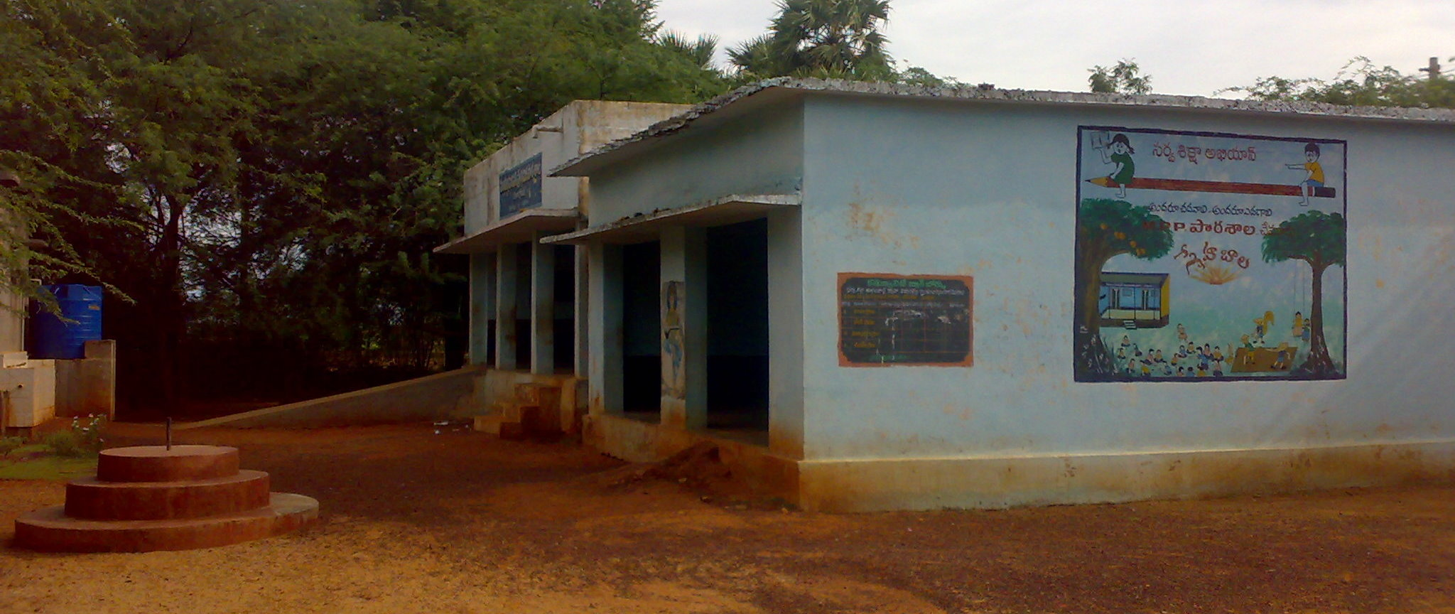 Primary School in Chemuru village